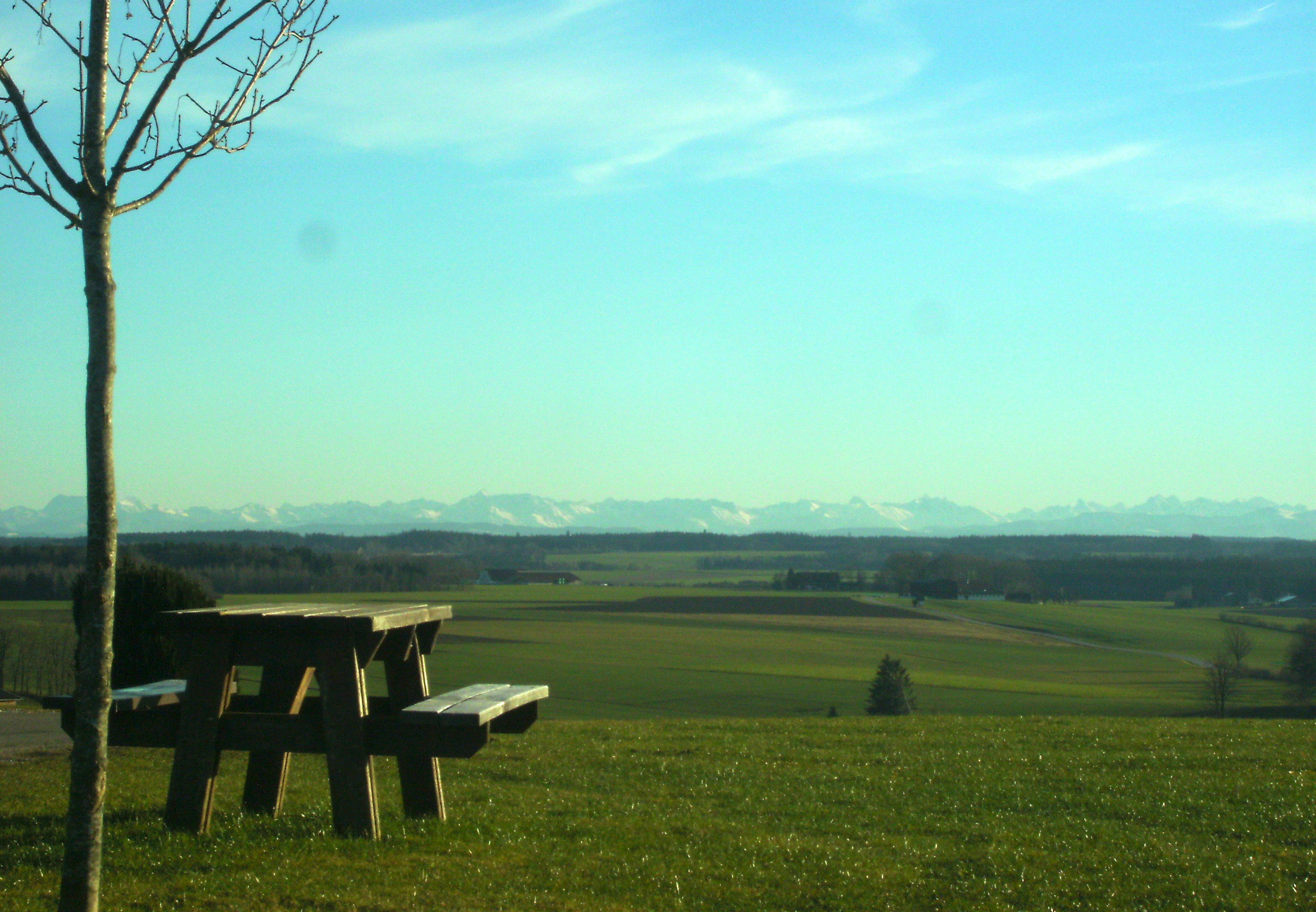 Feldkreuz beim Tristolzer Berg im Teilort Ellwangen von Rot an der Rot